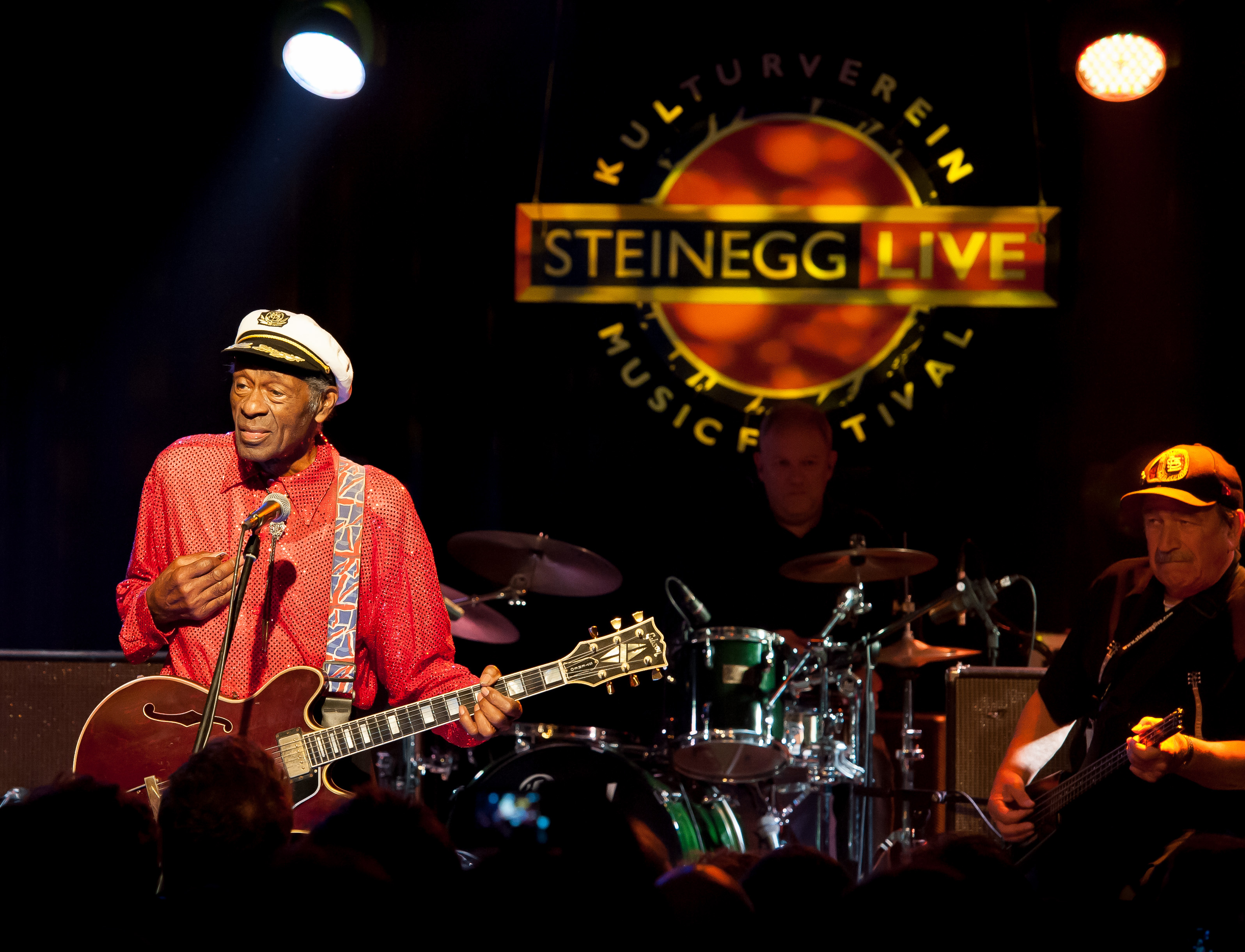 Chuck Berry beim Auftritt im Rahmen des Steinegg Live Festivals 2013